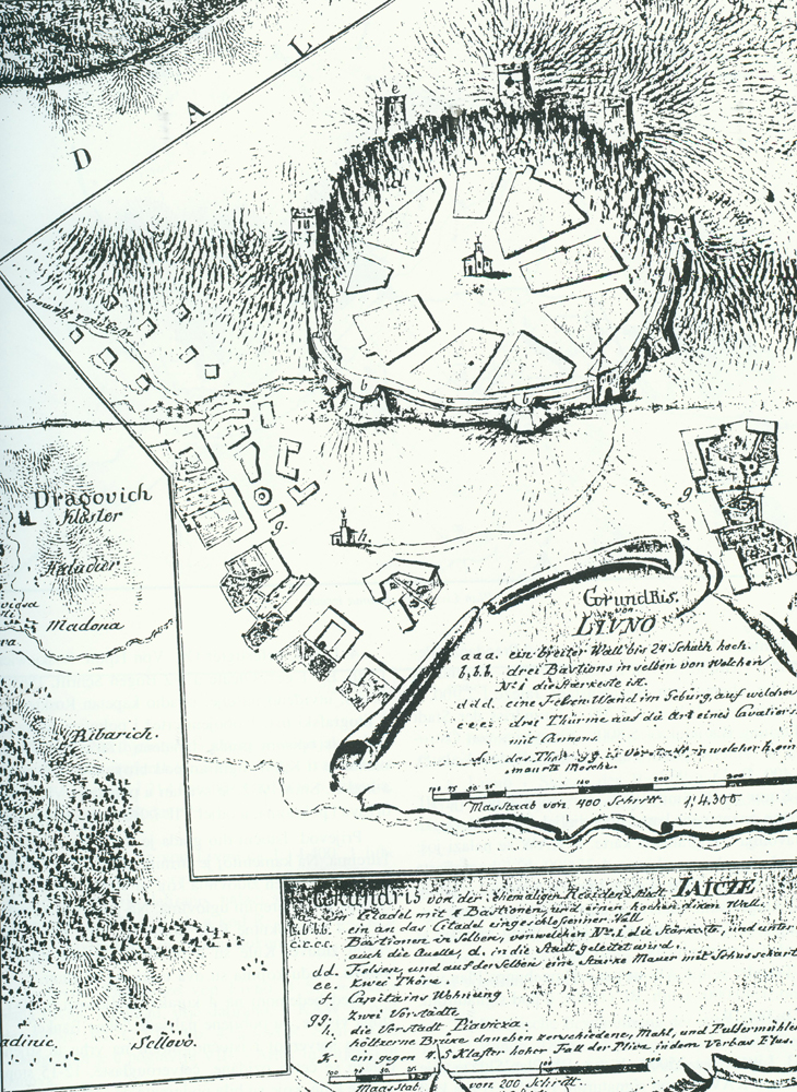 Plan Livna iz 1795. godine.